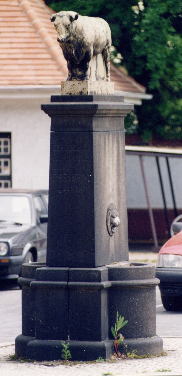 Städtischer Vieh- und Schlachthof Dresden, Stierbrunnen (Georg Wrba)